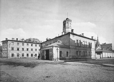 208. Арбатскiй полицейскiй домъ въ Столовомъ пер.